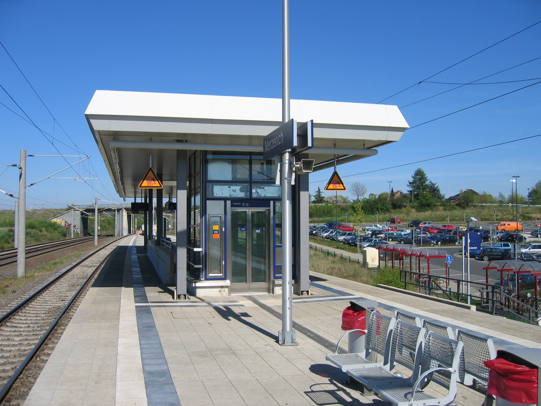 Merzenich S-Bahn Haltestelle